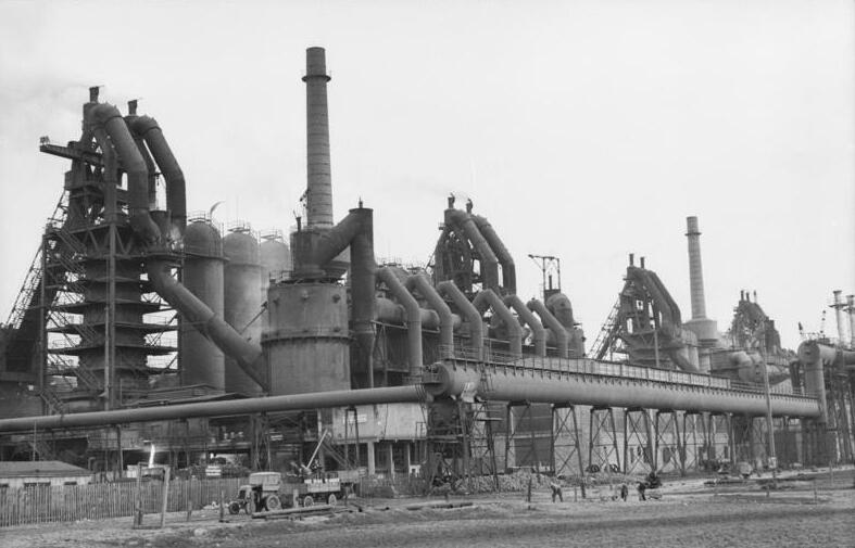 Eisenhüttenkombinat Ost ADN-Zentralbild/Sturm 10.11.1952 Das Eisenhüttenkombinat Ost (Aufnahme vom November 1952) Das Eisenhüttenkombinat Ost ist ein Schwerpunkbau in unserem Fünfjahresplan. Durch die Errichtung dieses Betriebes an der Oder-Neiße-Friedensgrenze kommt die tiefe Freundschaft zum Ausdruck, welche die Völker des Friedenslagers miteinander verbindet, denn in diesem Werk wird mit polnischer Kohle sowjetisches Erz für die deutsche Industrie verhüttet. Sowjetische Ingenieure helfen unseren Technikern ständig beim Bau der Hochöfen.